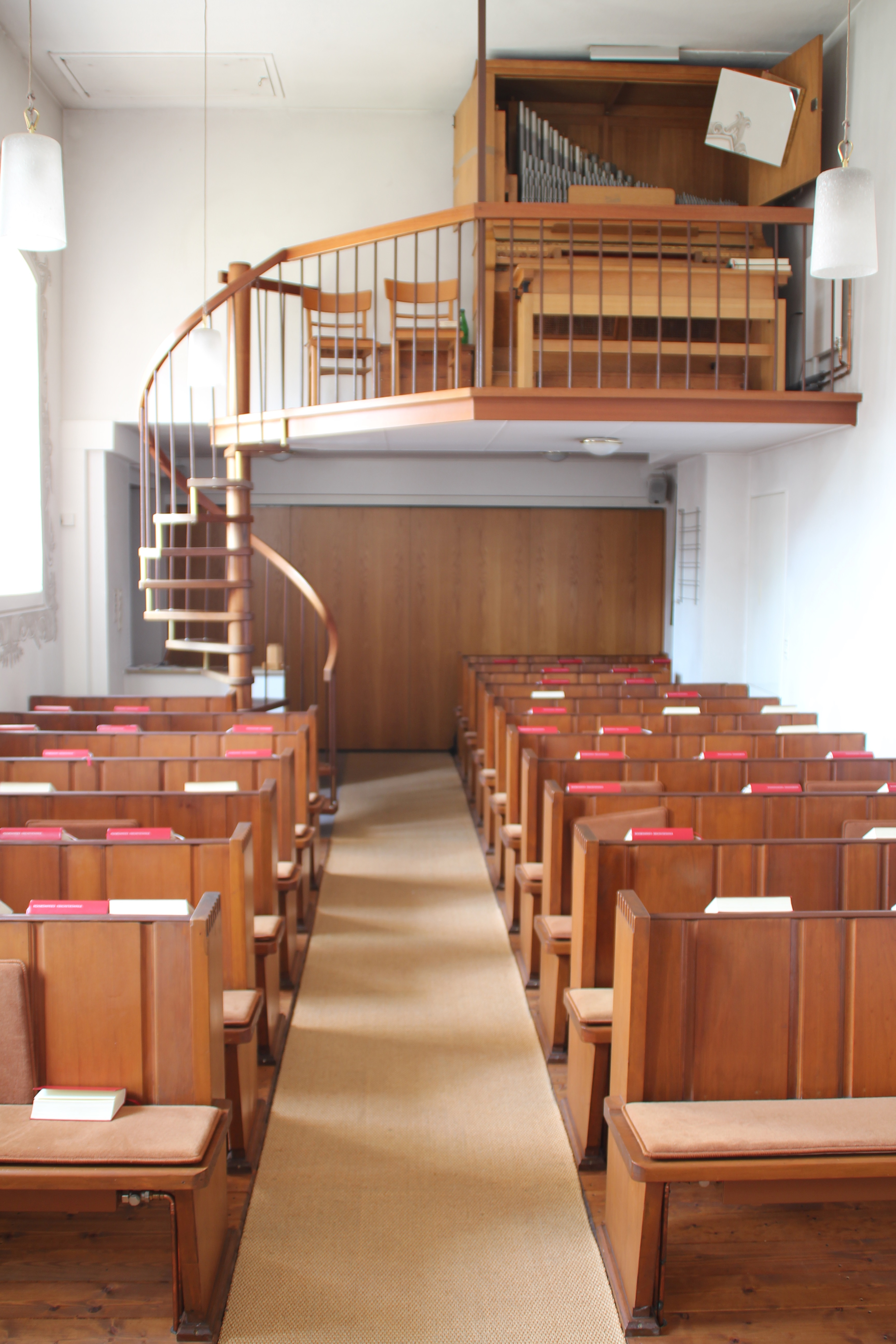 Innenraum der Evangelischen Kirche Lindenstruth, Gemeinde Reiskirchen, Landkreis Gießen, Hessen, Deutschland